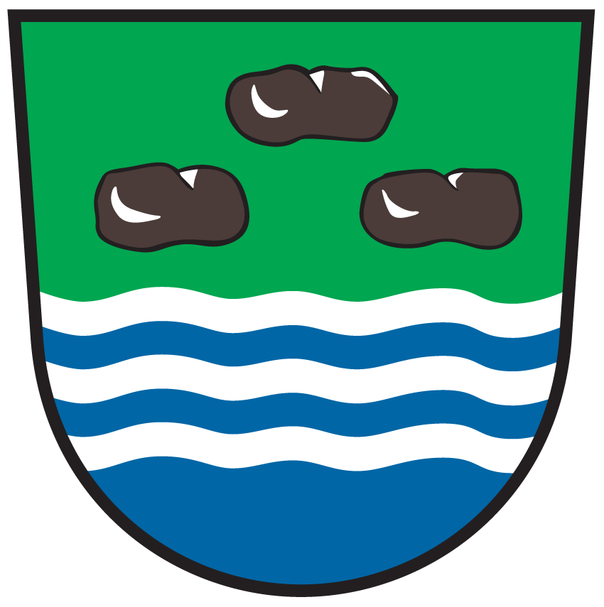 Wappen von St. Kanzian amm Klopeiner See